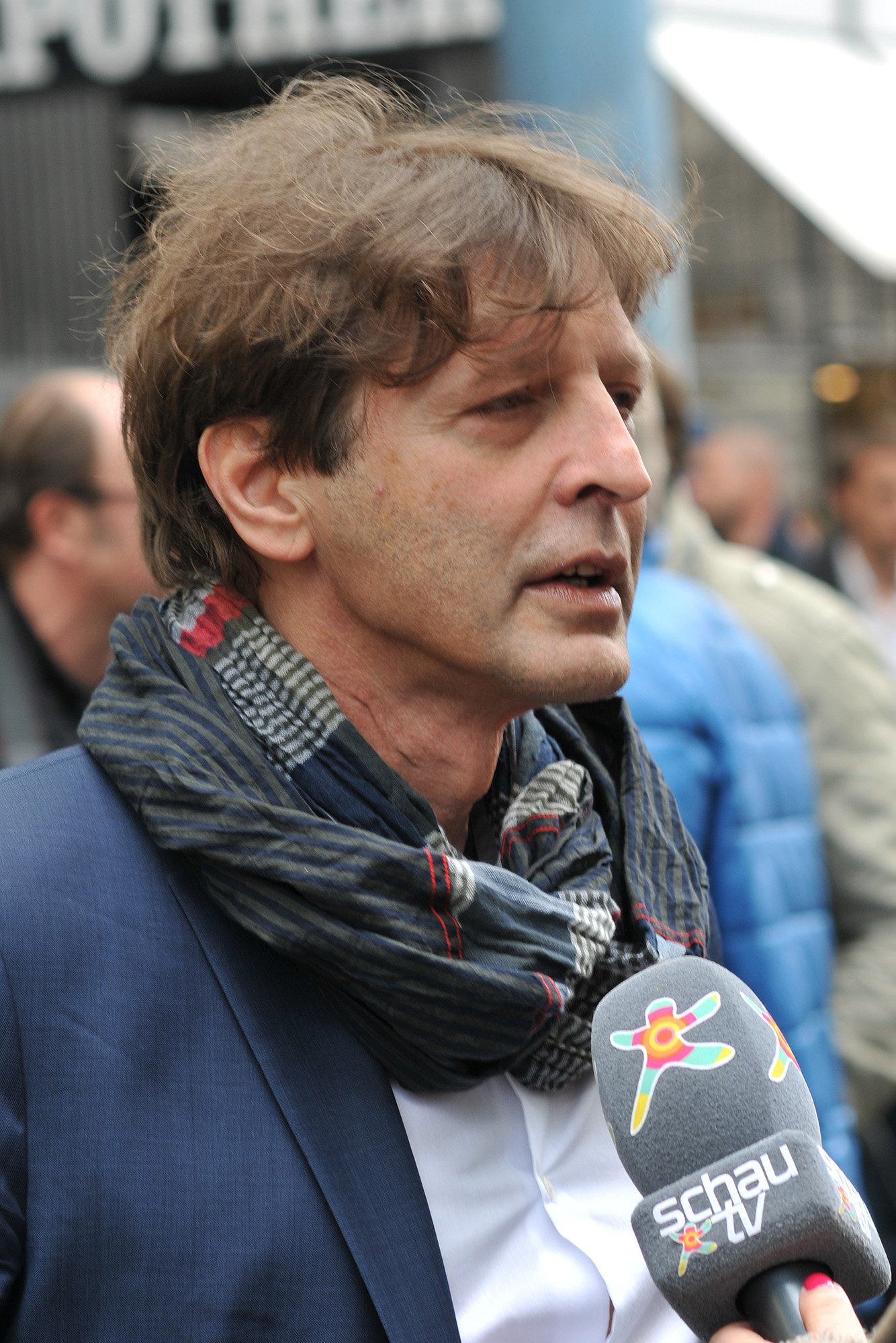 Spatenstich in der Mariahilfer Straße am 20. Mai 2014: Thomas Blimlinger